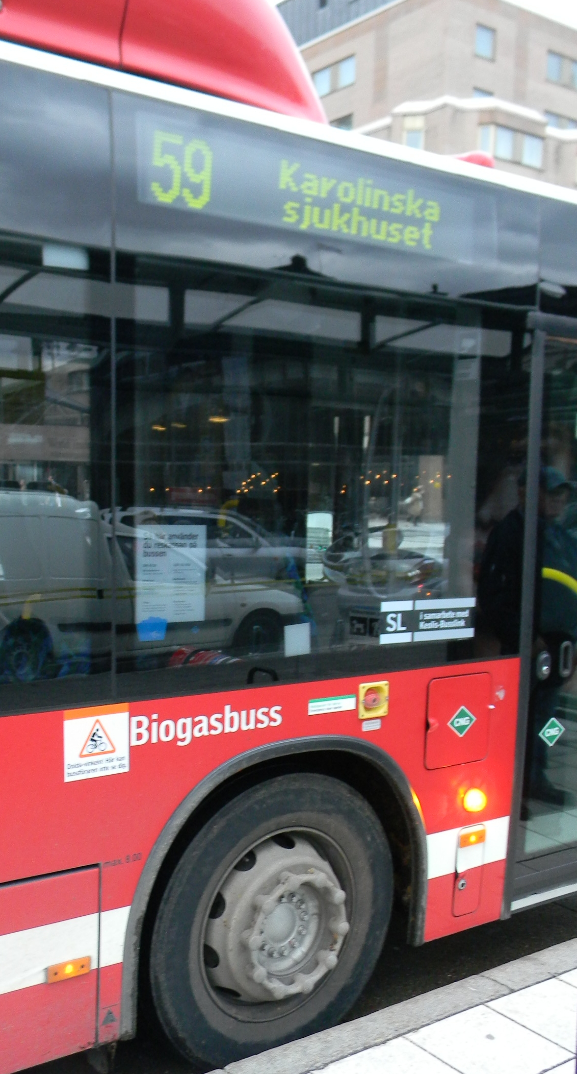 Biogasbuss i Stockholm